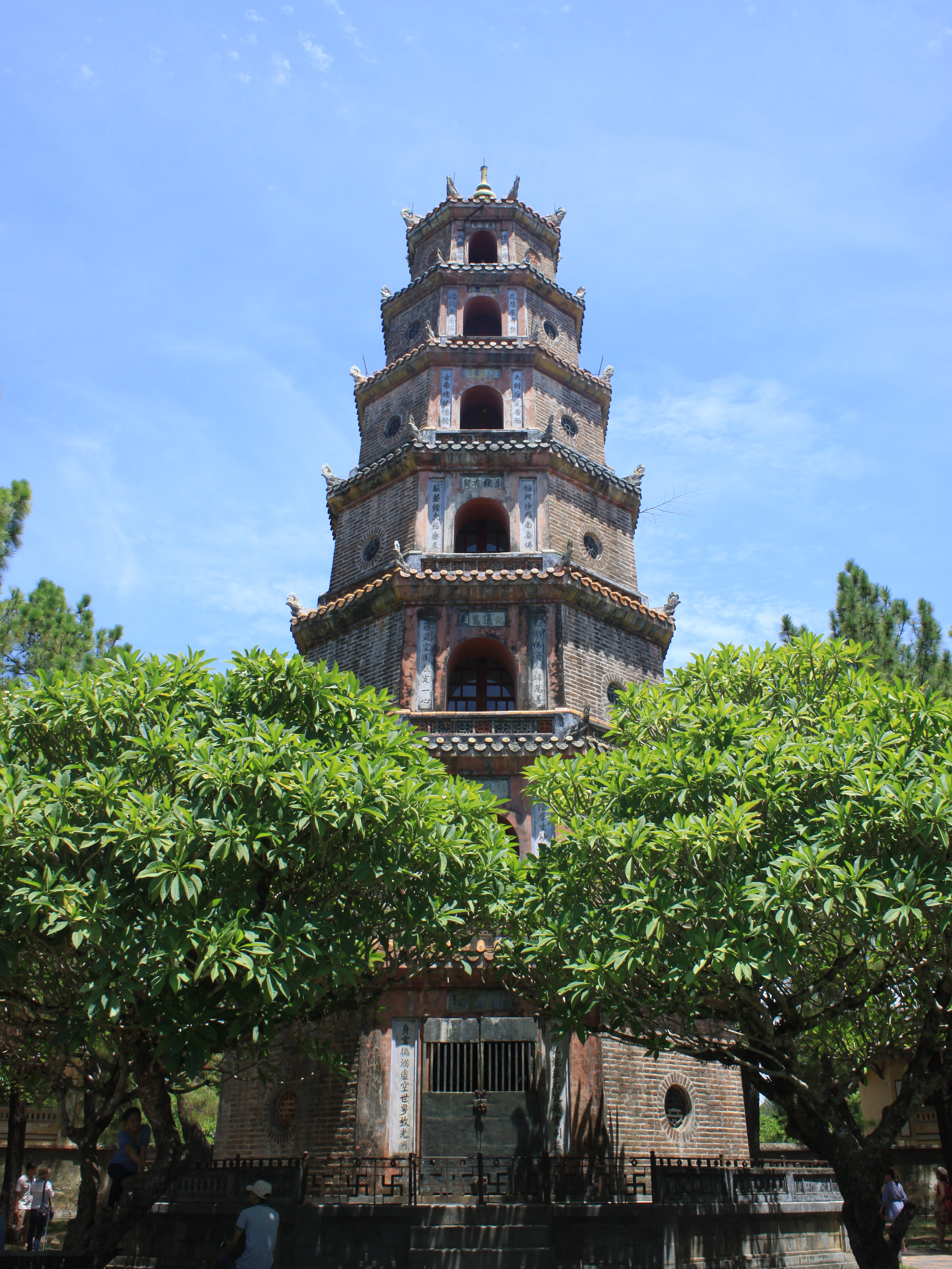 Tháp Phước Duyên, Chùa Thiên Mụ